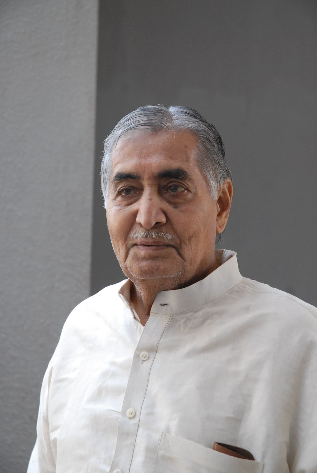 Kailash Joshi 15.JPG